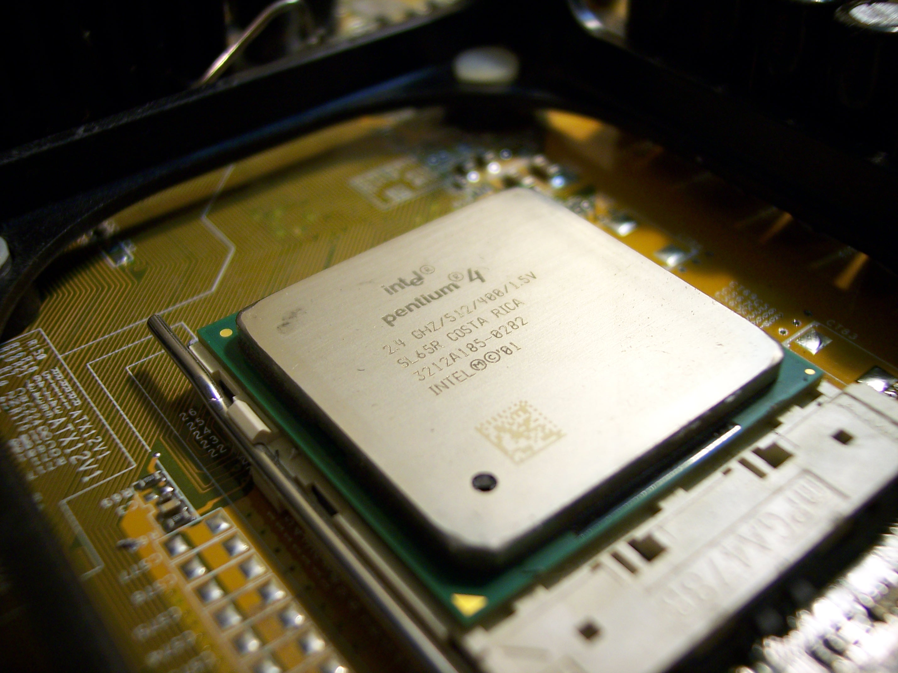 Pentium 4, 2.4 GHz